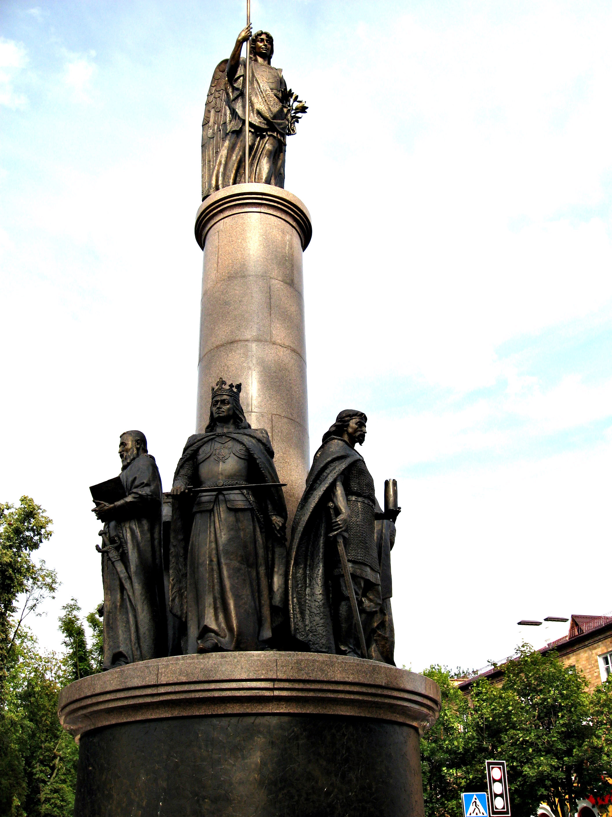 Lieninski rajon, Brest, Belarus